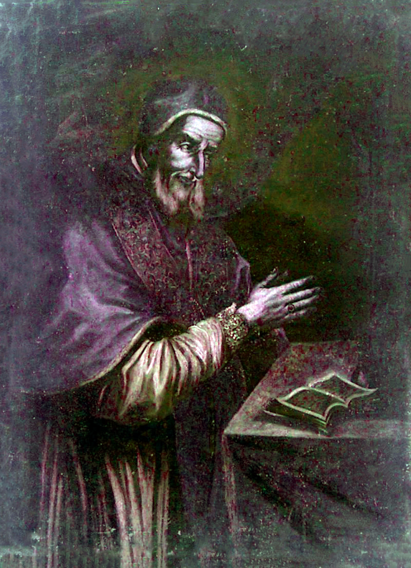 Papa Clemente IX in preghiera Pope Clement IX praying